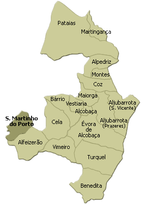 localisation de sao martinho do porto sur la freguesia de alcobaça